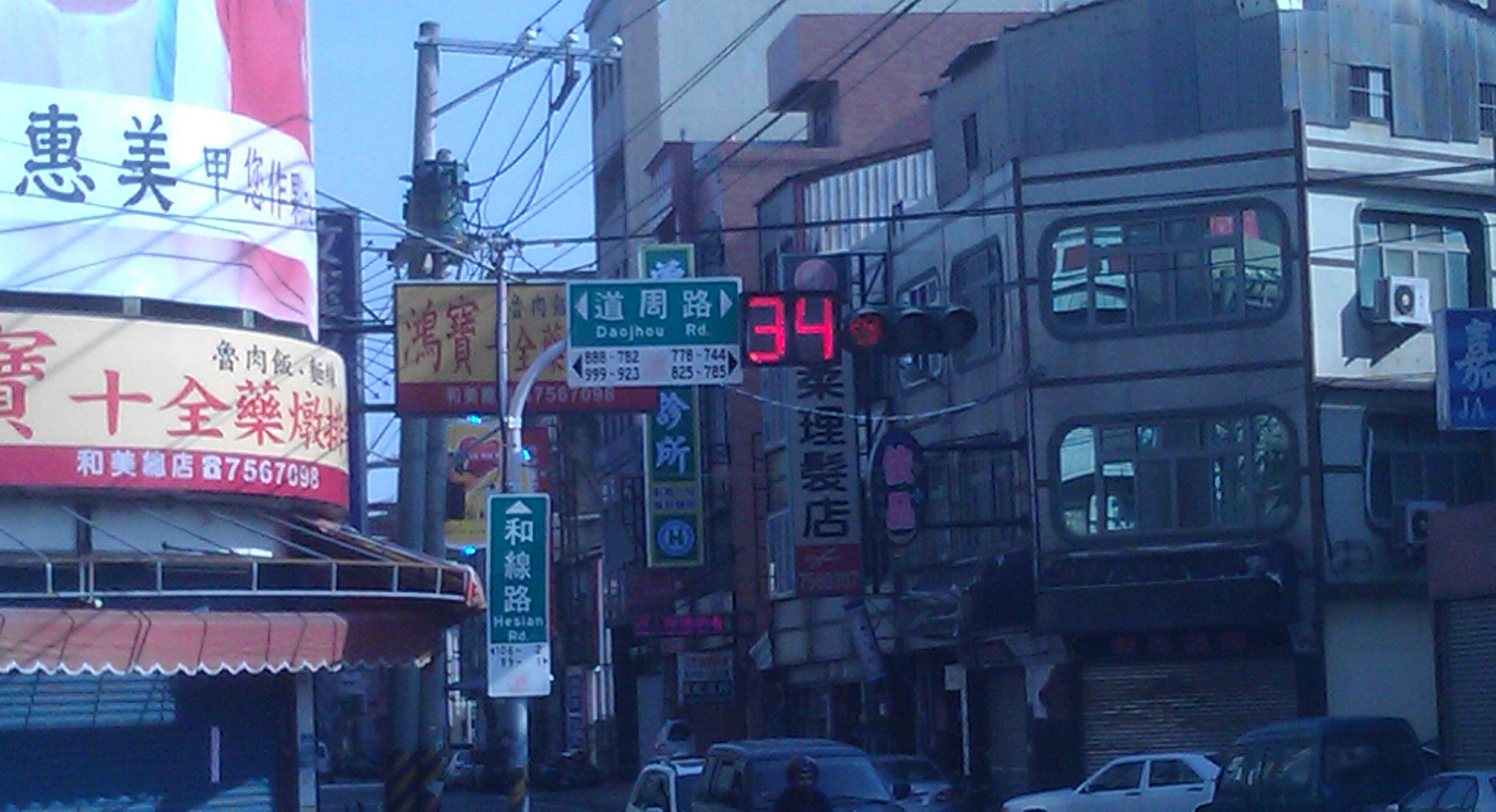 彰化縣和美鎮道周路與和線路口紅綠燈亮紅燈。